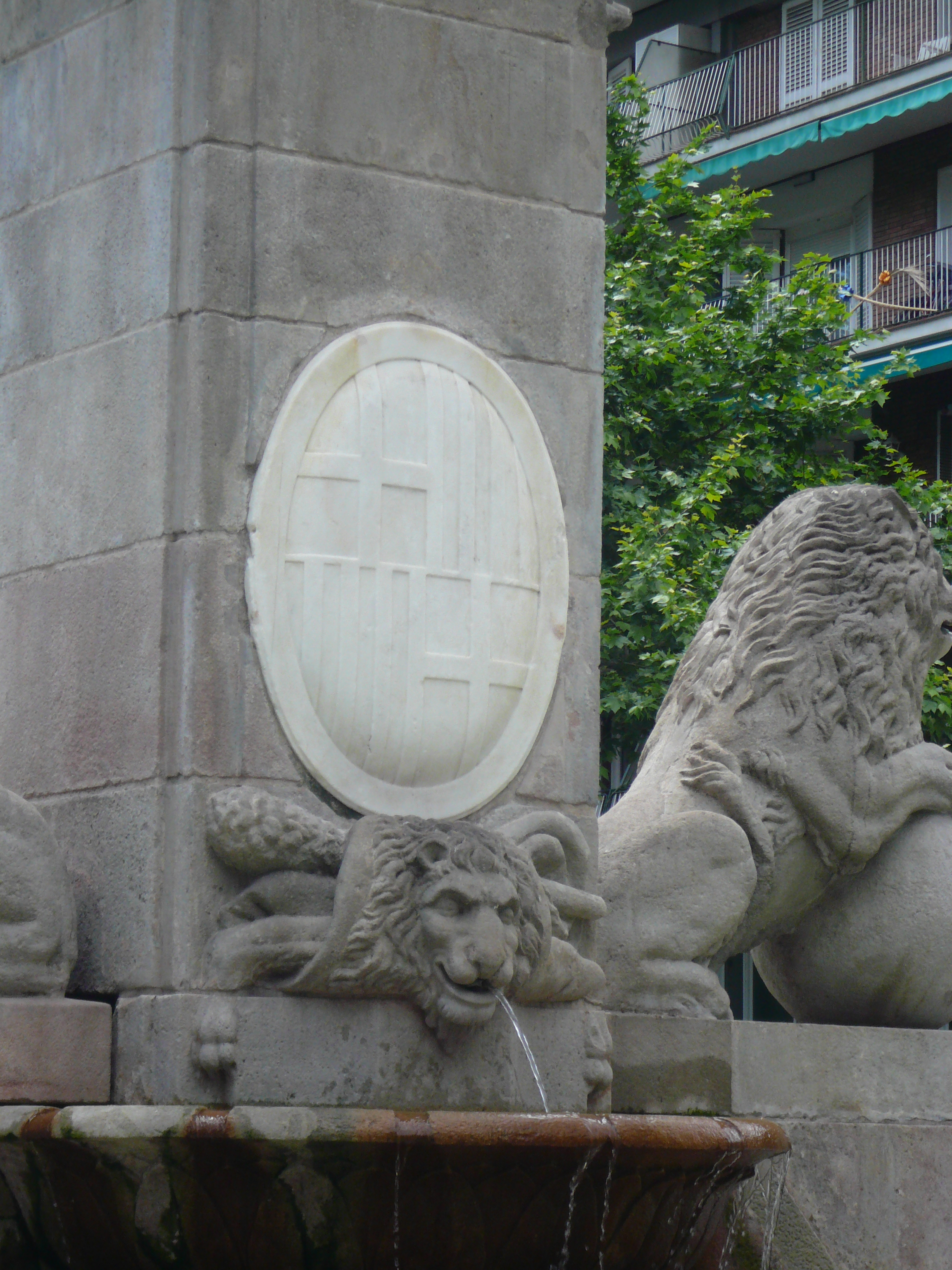 Font d'Hèrcules. Pg. de Sant Joan amb Còrsega (Barcelona). Escultor: Salvador Gurri (projecte), Josep Moret (execució). Material: pedra calcària amb medallons de marbre. 1802, en l'actual emplaçament des de 1928. 66″ N, 2° 09′ 59″ E